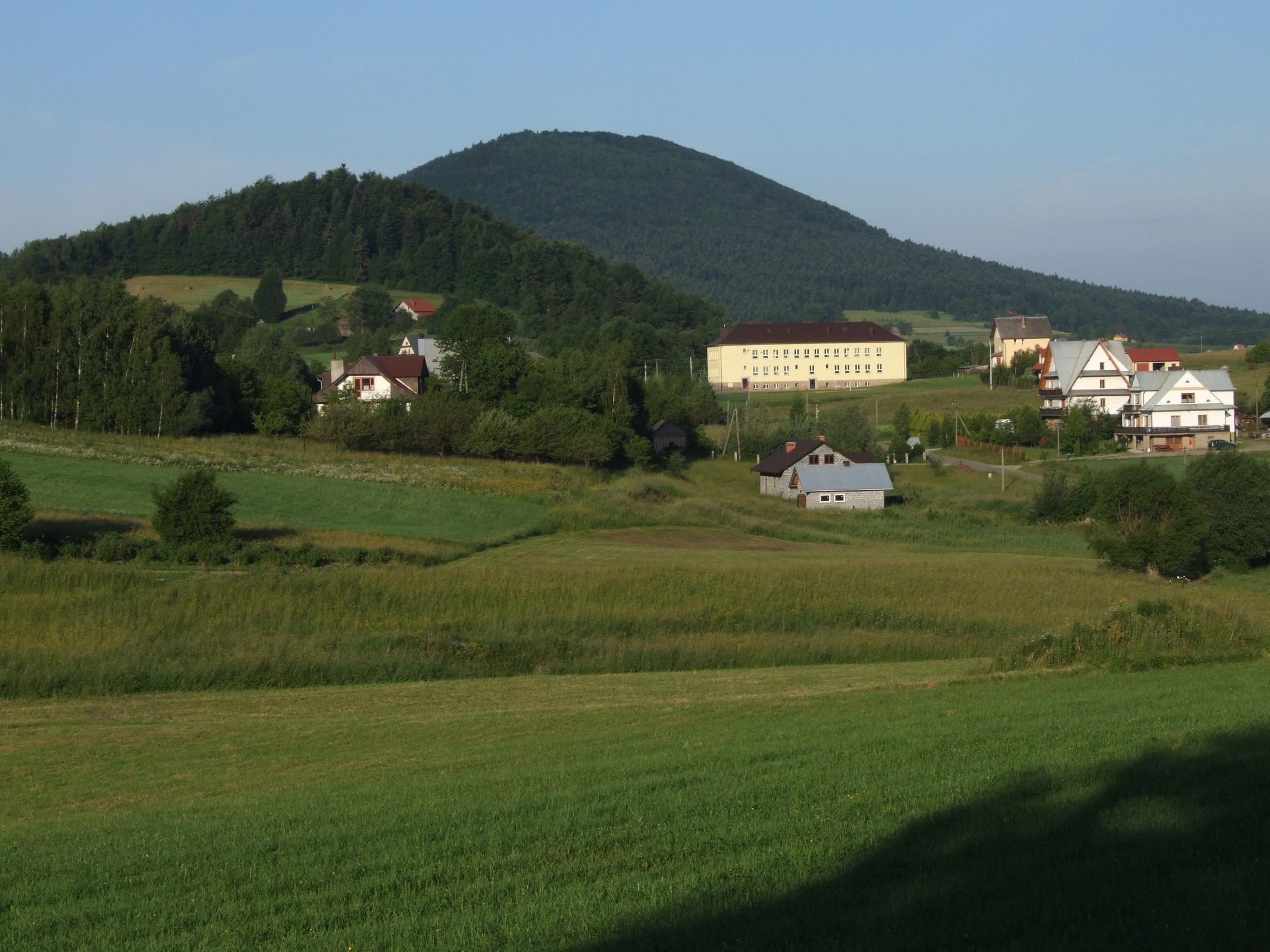 Widok od północnej strony na górę Kostrza i Nowe Rybie